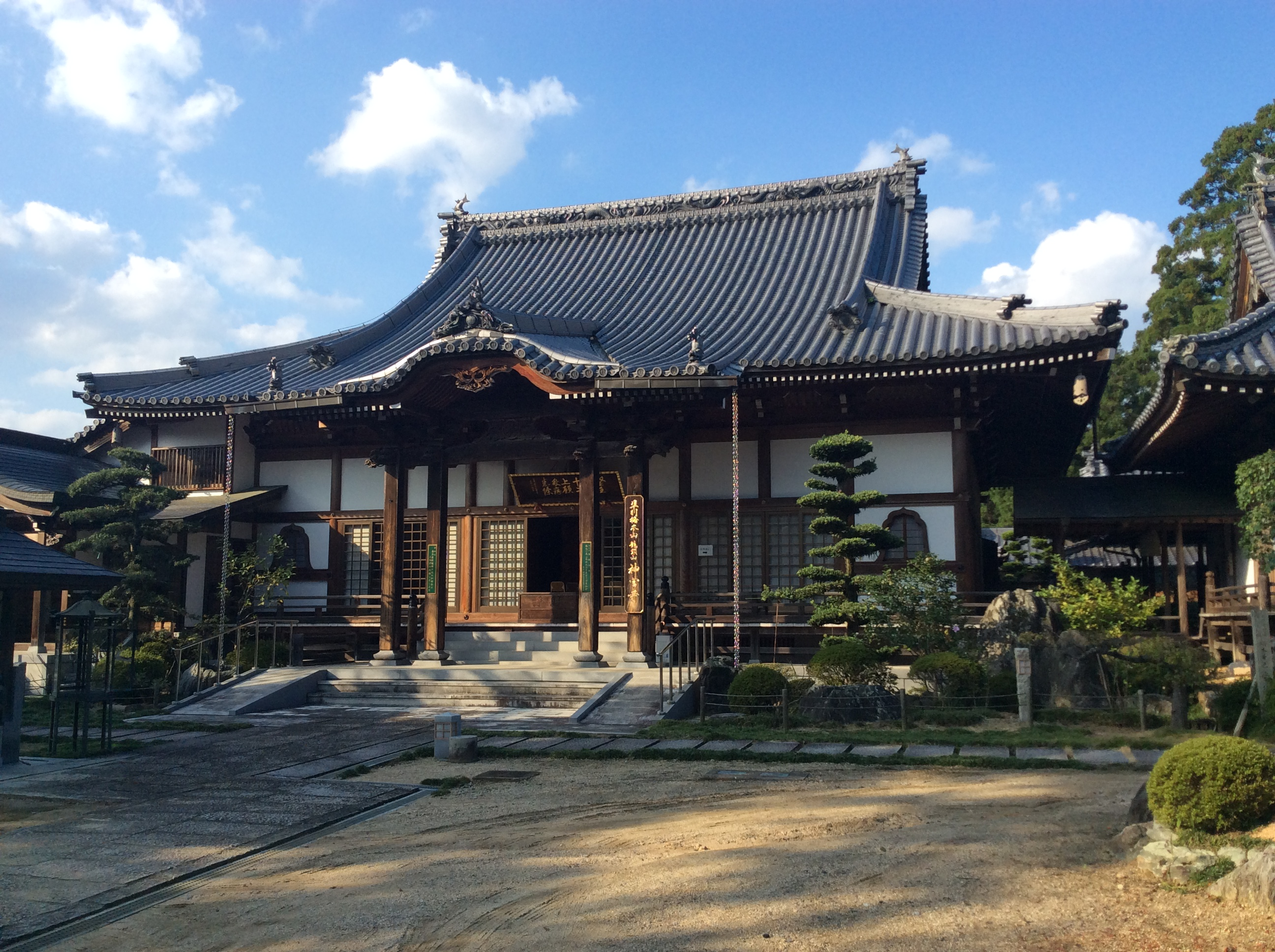 徳島県美馬郡つるぎ町半田にある神宮寺の本堂